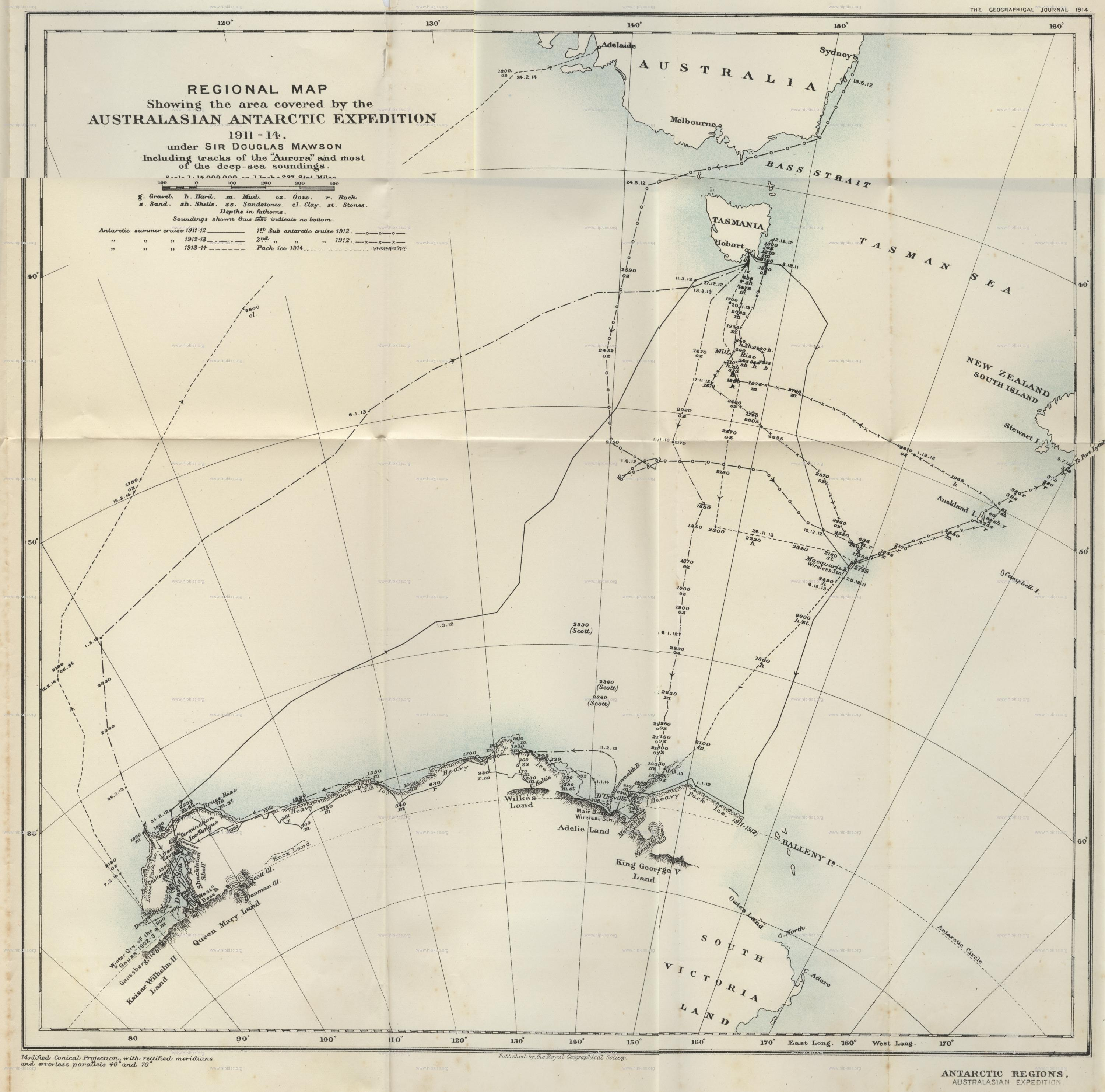 Карта маршрута Австралийской антарктической экспедиции (1911 - 1914 годов)